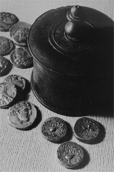 קופסת מטבעות